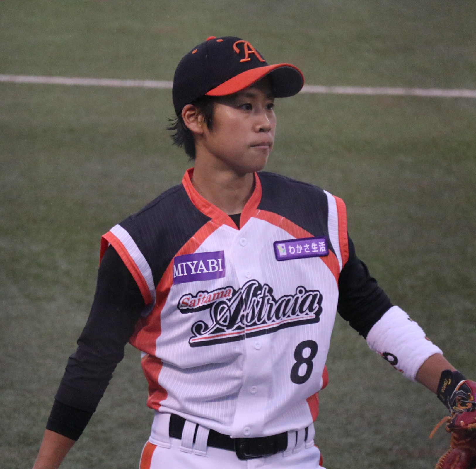 中田友実選手